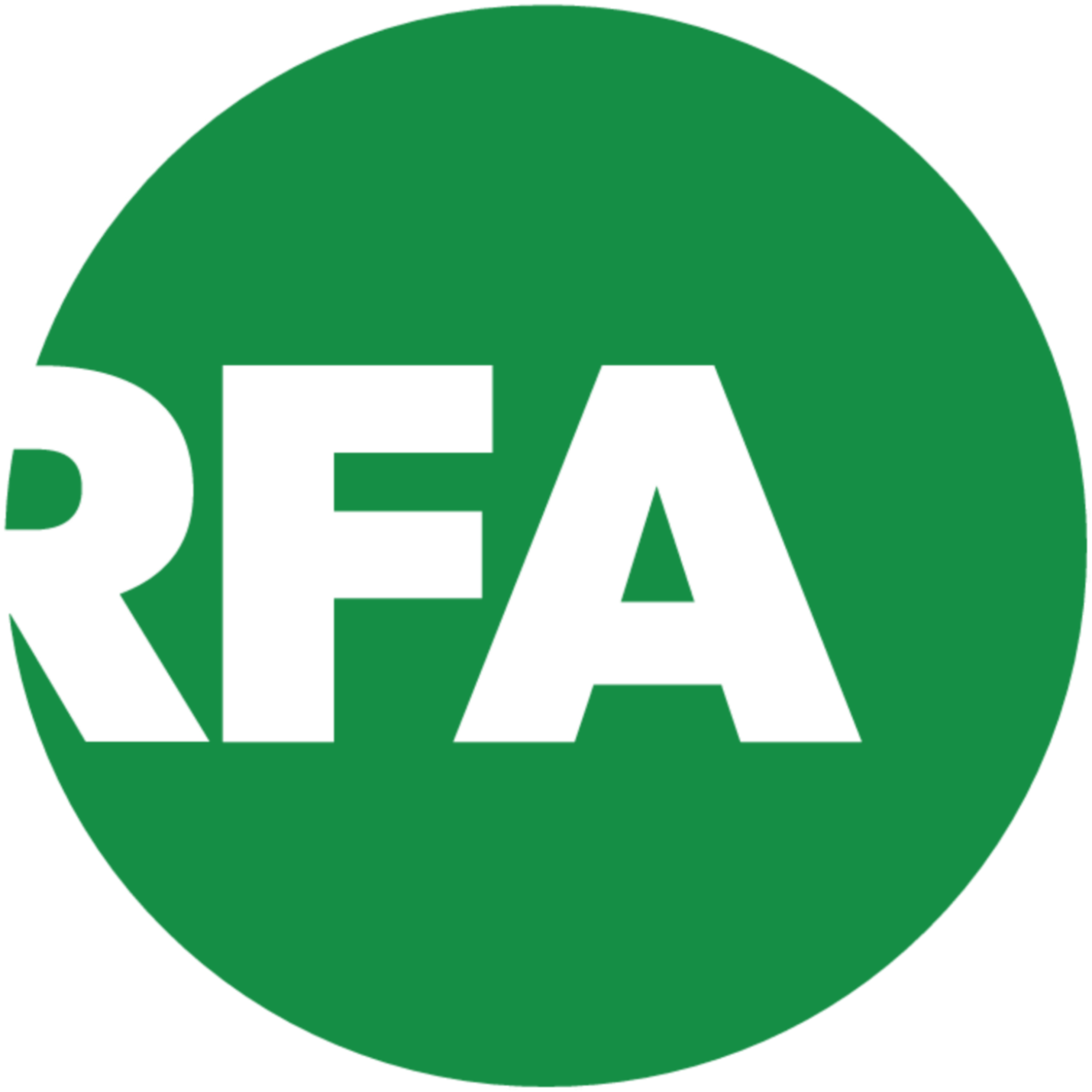 Đây là biểu trưng để đại diện cho Đài Á Châu Tự Do.